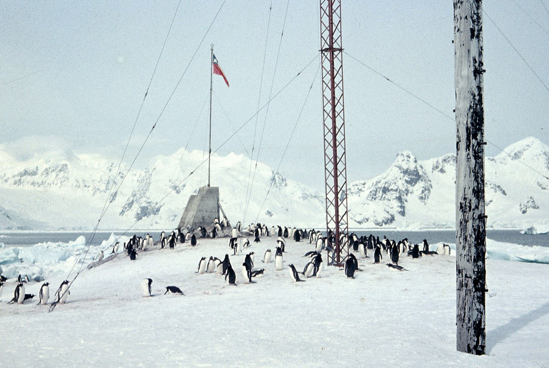 En Base Gabriel González Videla de la Fuerza Aérea de Chile. Tierra de O'Higgins. Bahía Paraíso